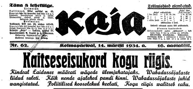 Ajalehe Kaja päismik